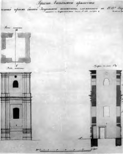 Беларуская (тарашкевіца): Берасьце (Bieraście), рог пляцу Рынку (plac Rynak) і вуліцы Кавальскай (vulica Kavalskaja). Касьцёл Езуса і Сьвятога Казімера пры калегіюме езуітаў, званіца